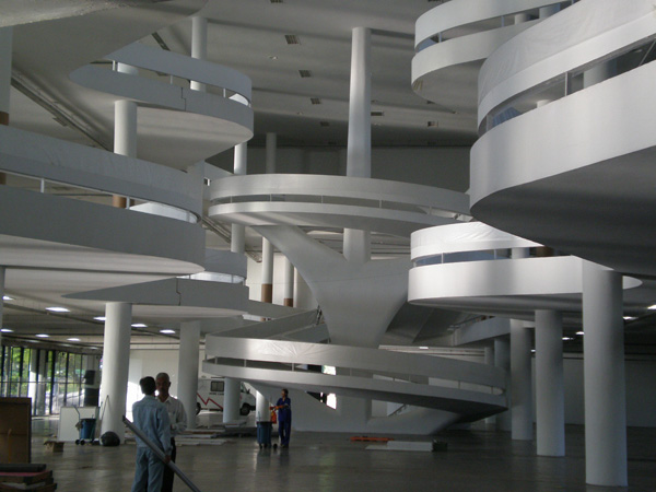 Sao Paulo architecture